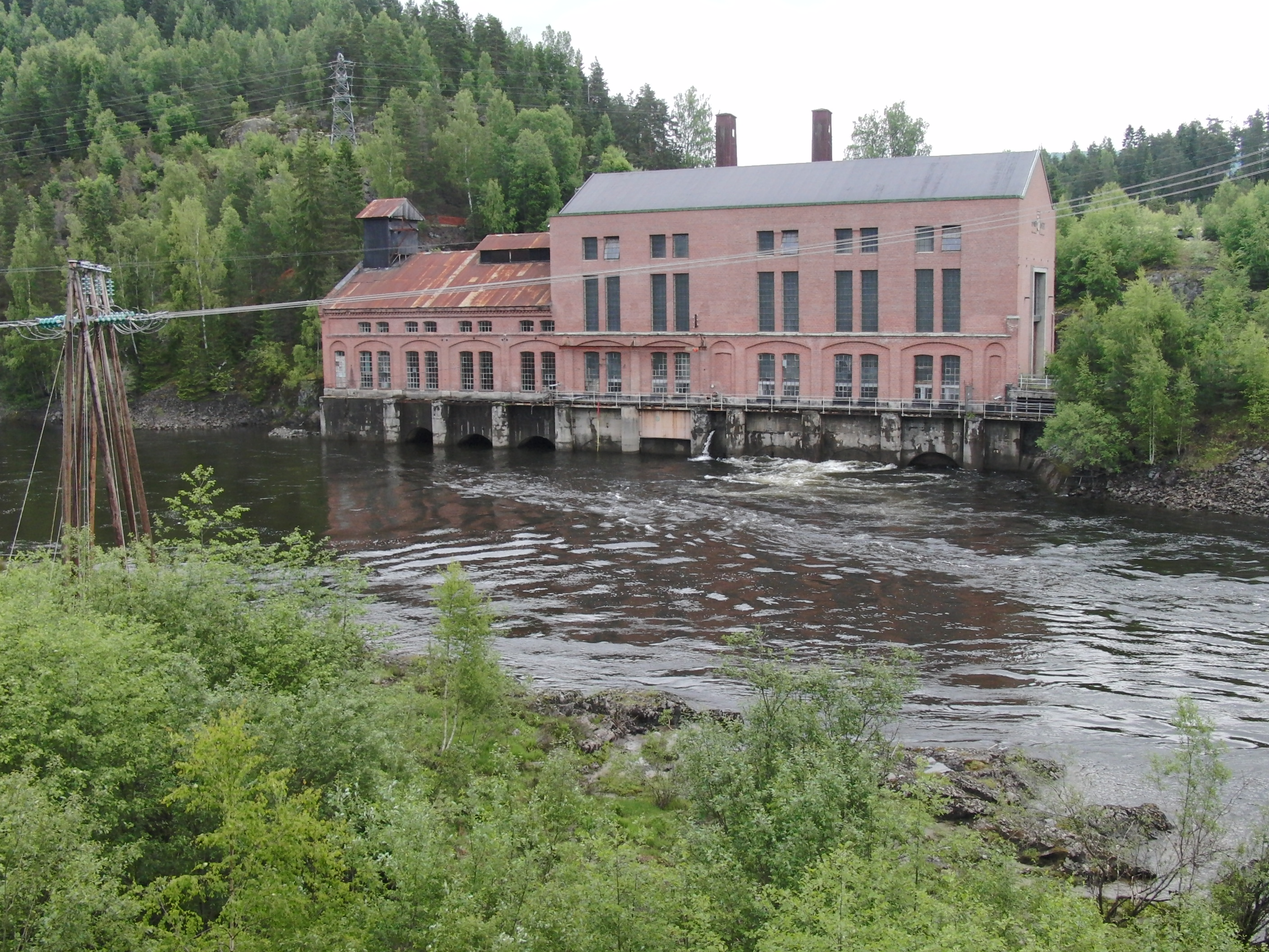 Gamle Gravfoss 1 kraftstasjon